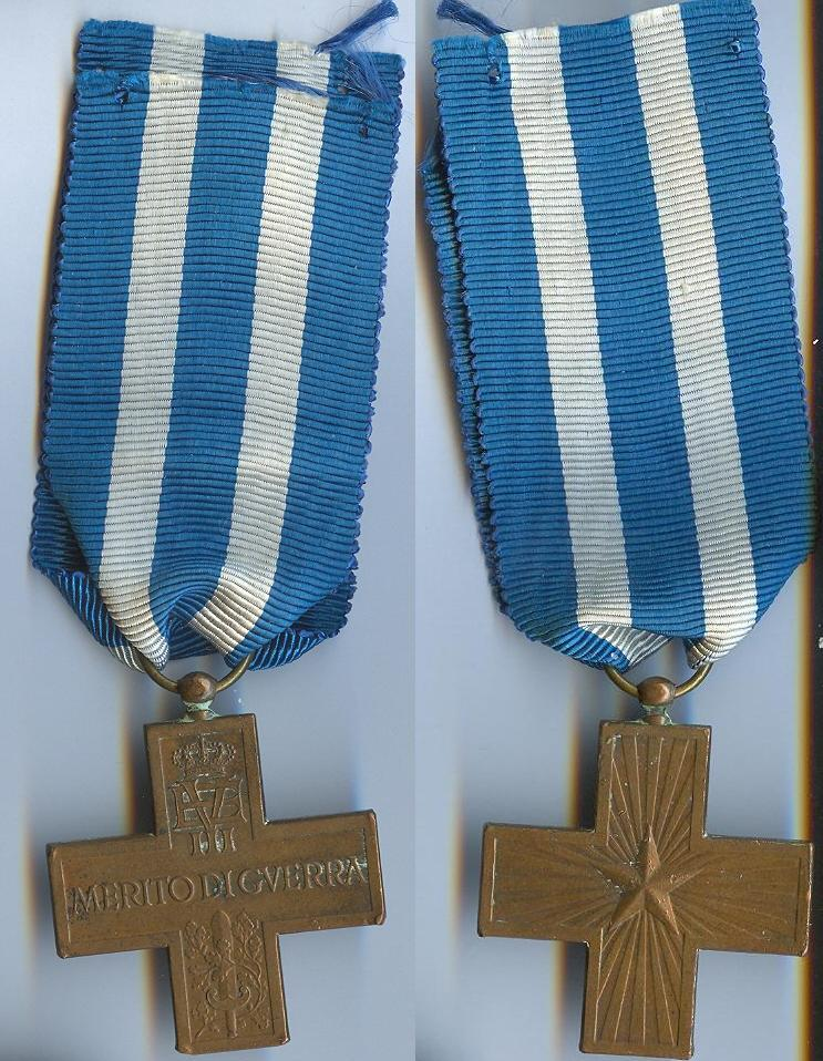 Croce al Merito di guerra (regno)